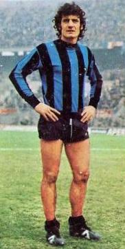 Il calciatore italiano Giorgio Mariani all'Inter all'inizio della stagione 1974-75.